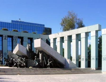 ওয়াসো স্মৃতি সৌধের ফটো